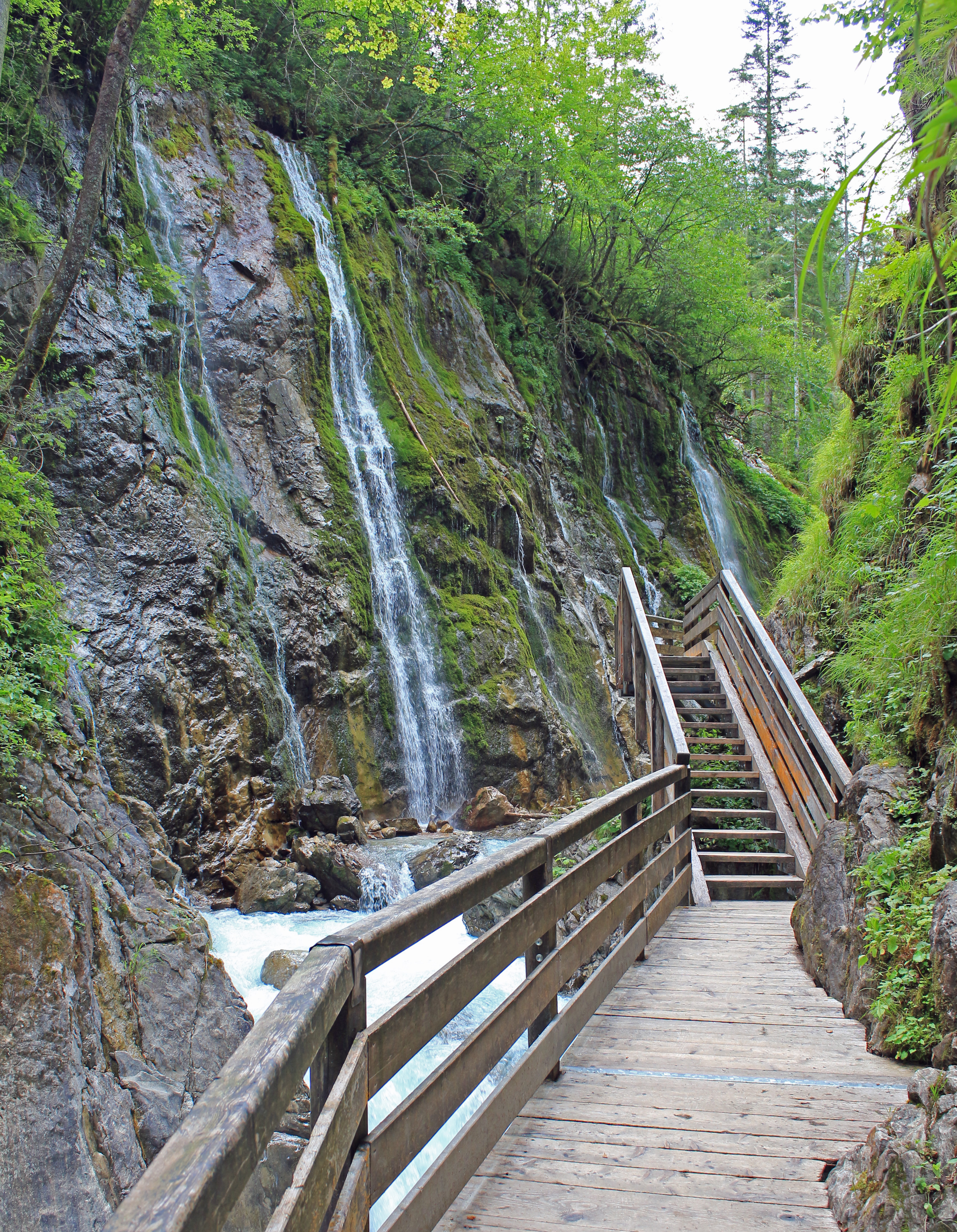 In der Wimbachklamm